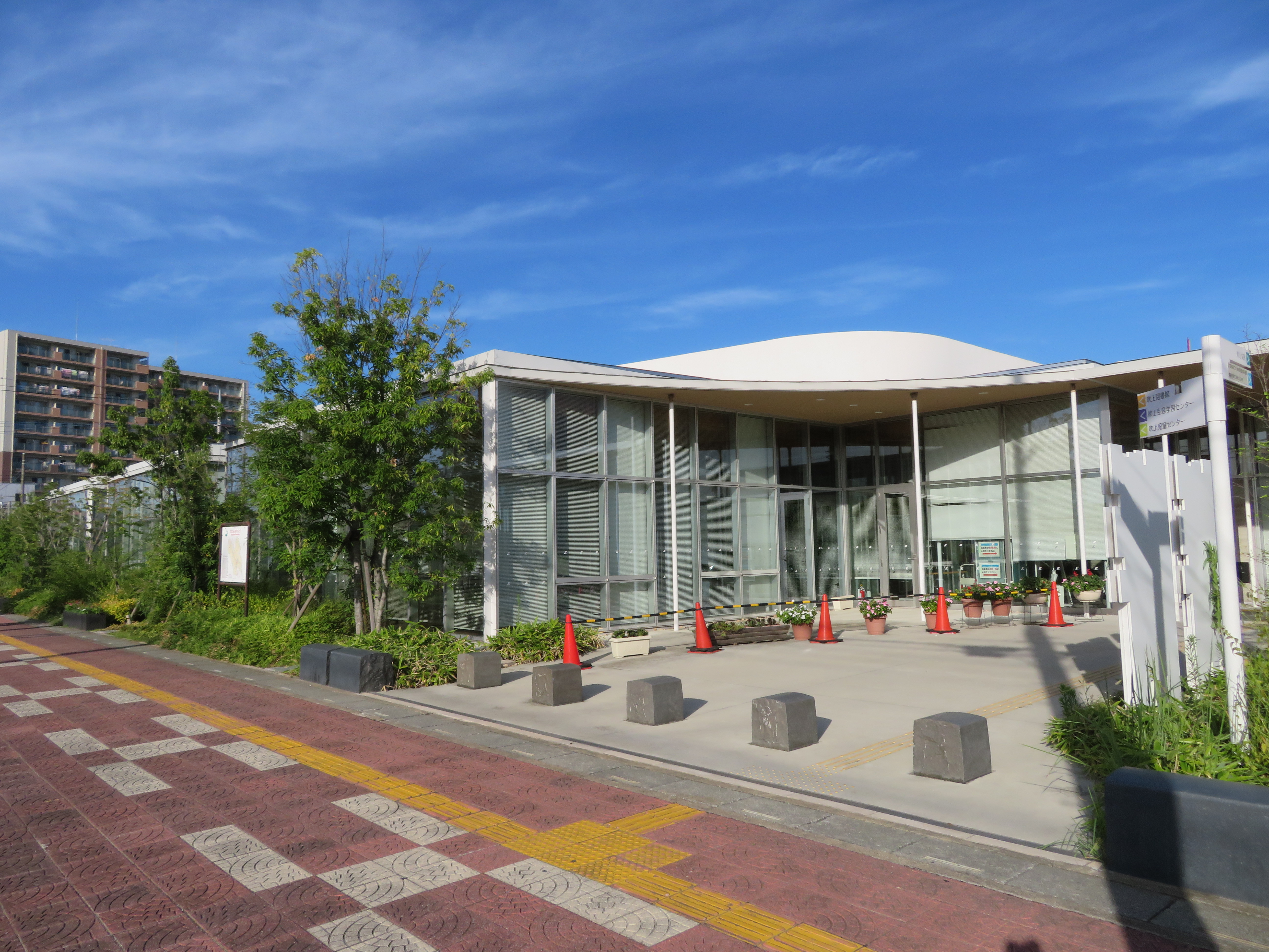 鴻巣市吹上生涯学習センター、吹上児童館、吹上図書館 Canon PowerShot SX720 HS